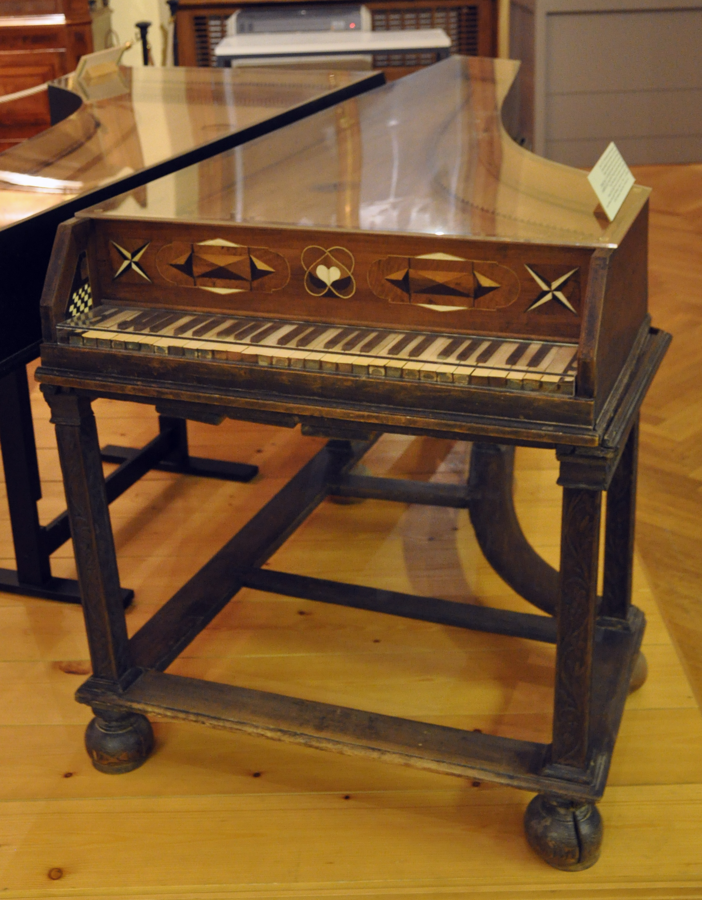 Cembalo bzw. Hammerflügel, Österreich 1696, bezeichnet „H. N. 1696“ (wohl Besitzermonogramm), das älteste erhaltene in Wien gebaute Cembalo, 1703 und später radikal verändert Wien, Kunsthistorisches Museum, Sammlung alter Musikinstrumente (Neue Burg), Inv. Nr. SAM 845